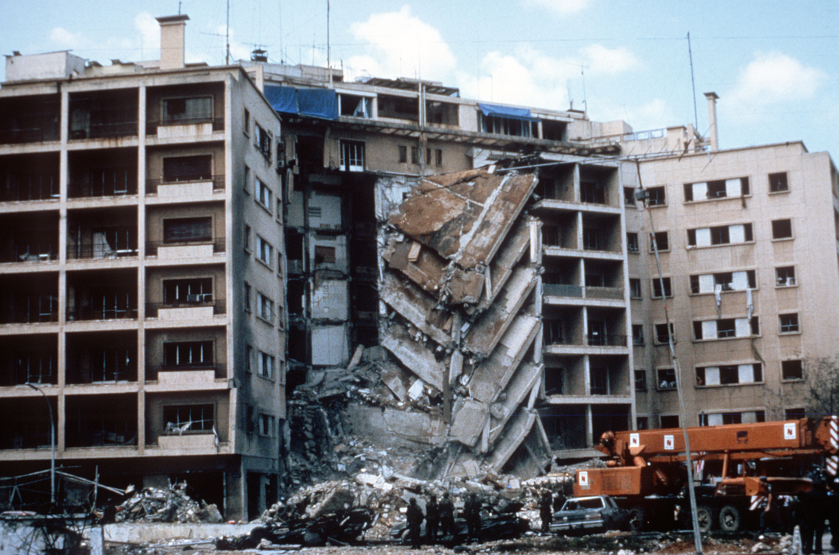 A view of damages to the U.S. Embassy caused by a terrorist bomb attack. Marines are here participating as members of a multinational peacekeeping force.